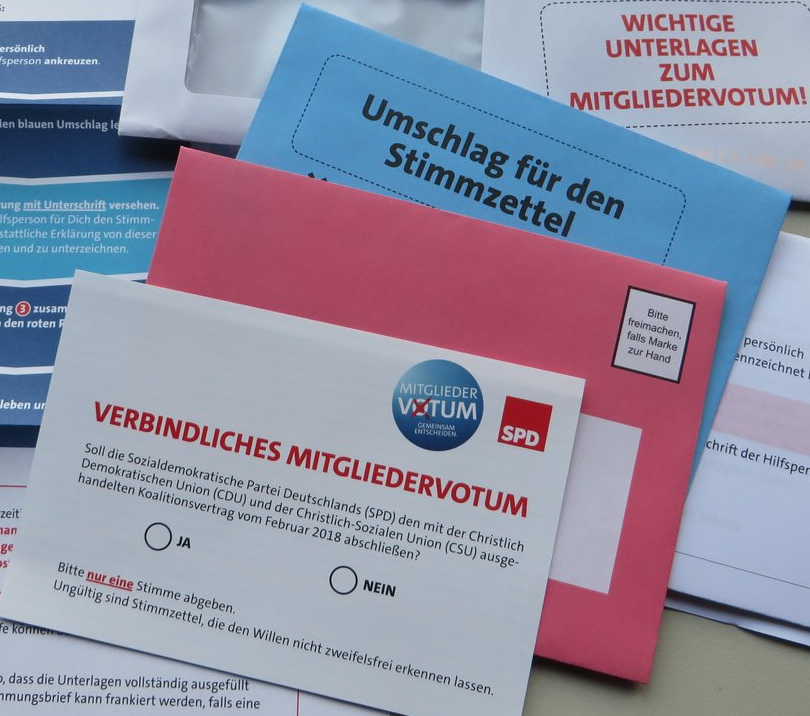 Foto der Abstimmungsunterlagen zum SPD Mitgliedervotum 2018 (mit GIMP nachbearbeitet und zu PNG konvertiert)